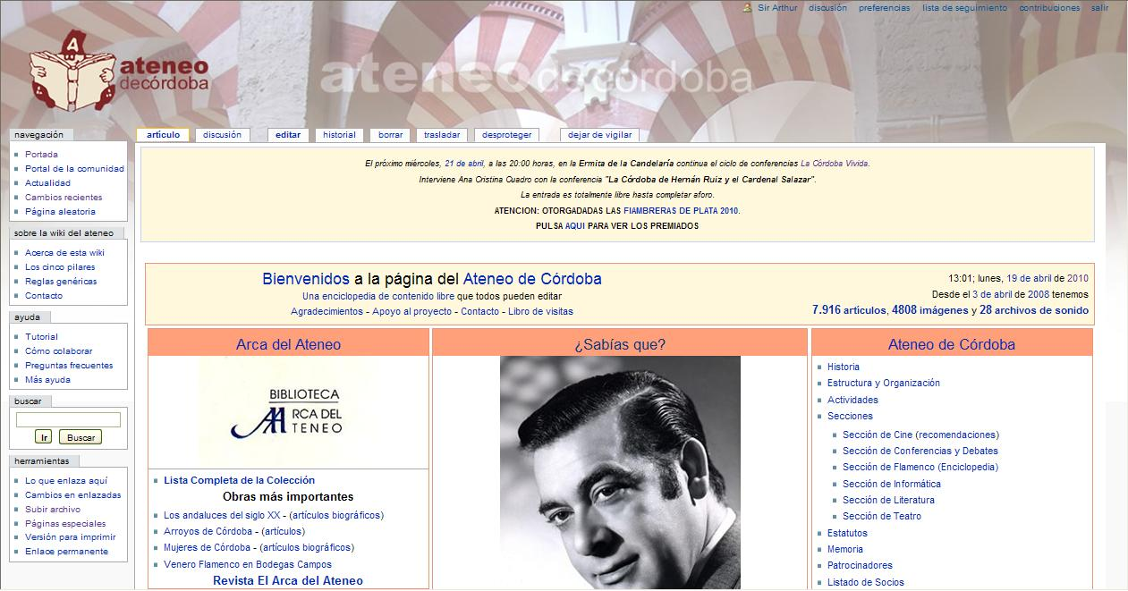 Portada de la Enciclopedia Wiki Ateneo de Córdoba